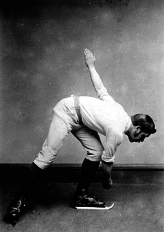 SKØYTELØPER, BANDYSPILLER, CHARLES GOODMAN TEBBUTT